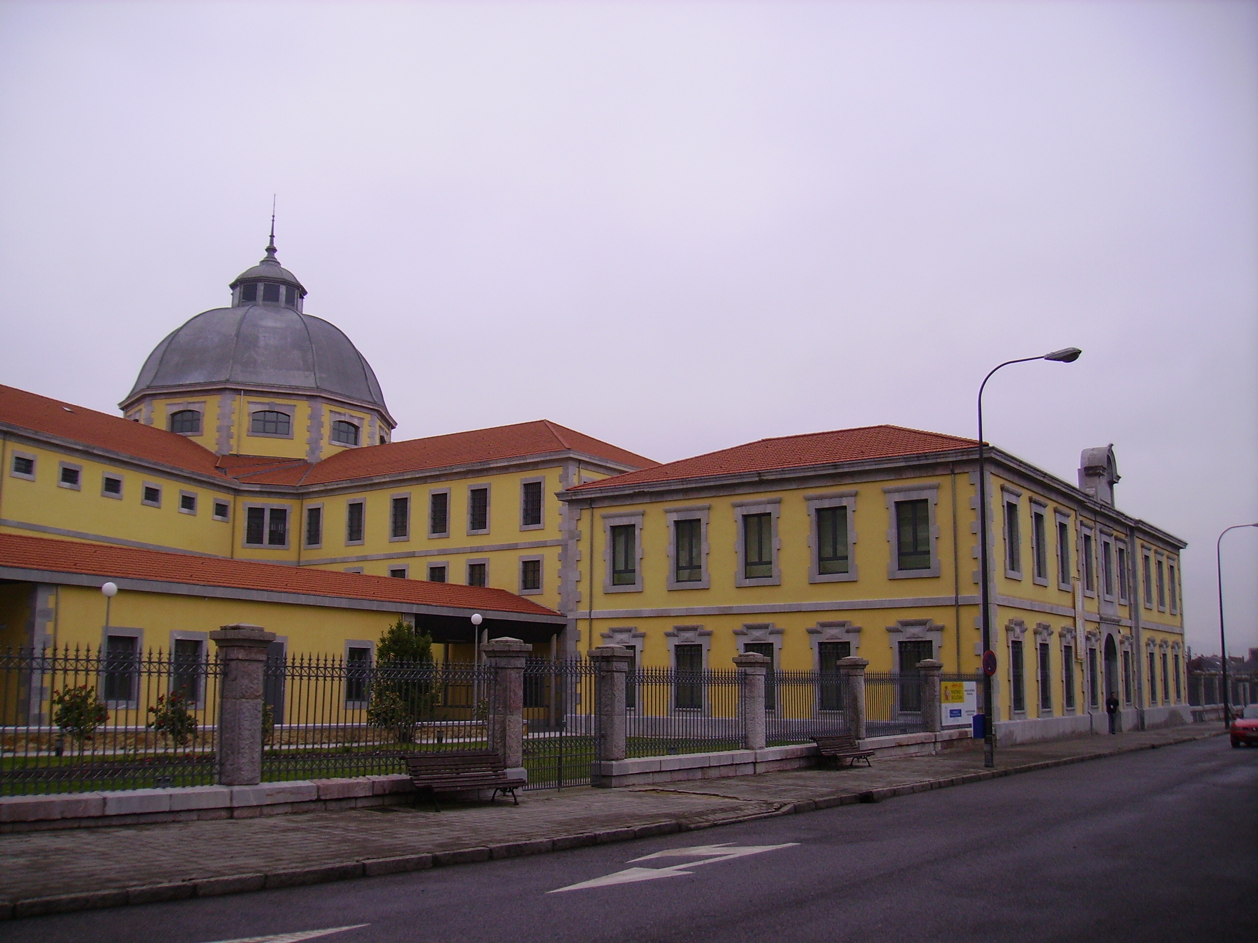 Sede actual del Archivo Histórico de Asturias, en la rehabilitada Cárcel Provincial de Oviedo.